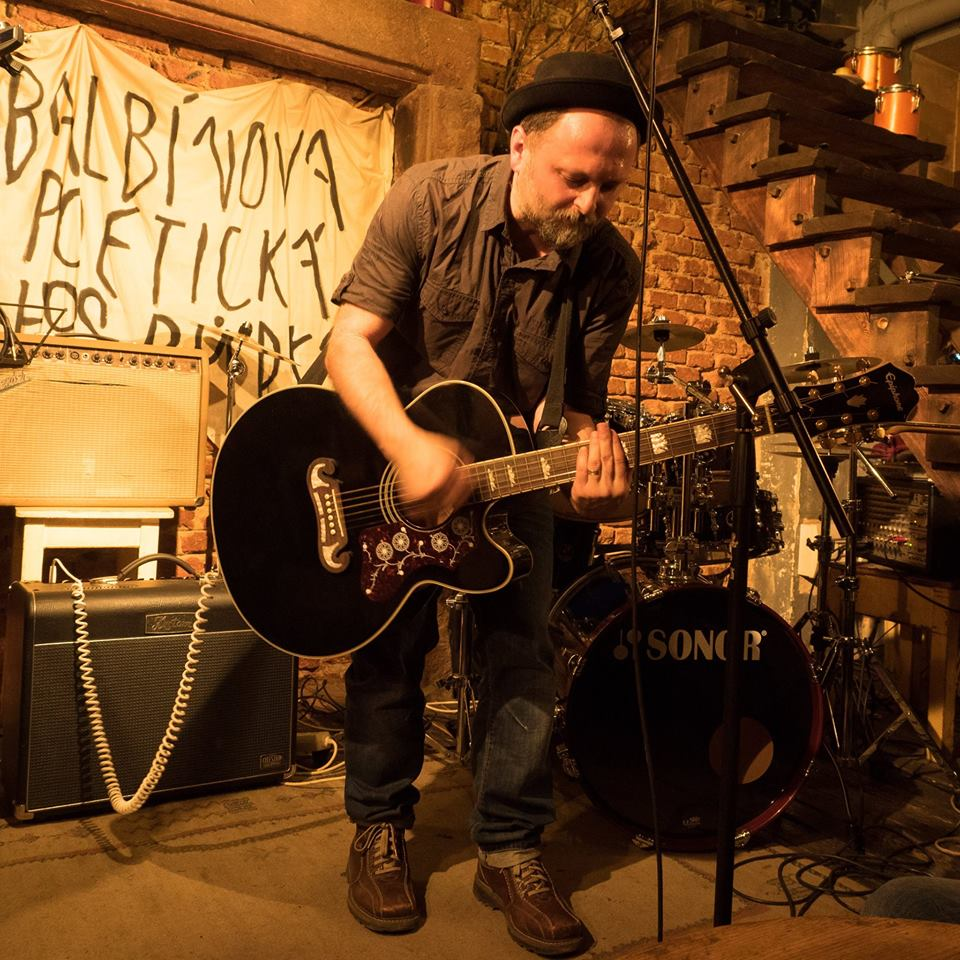 Marcel Kříž v Balbínce. 17.3.2016